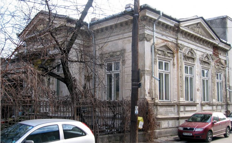 Casa Marinela Păunescu